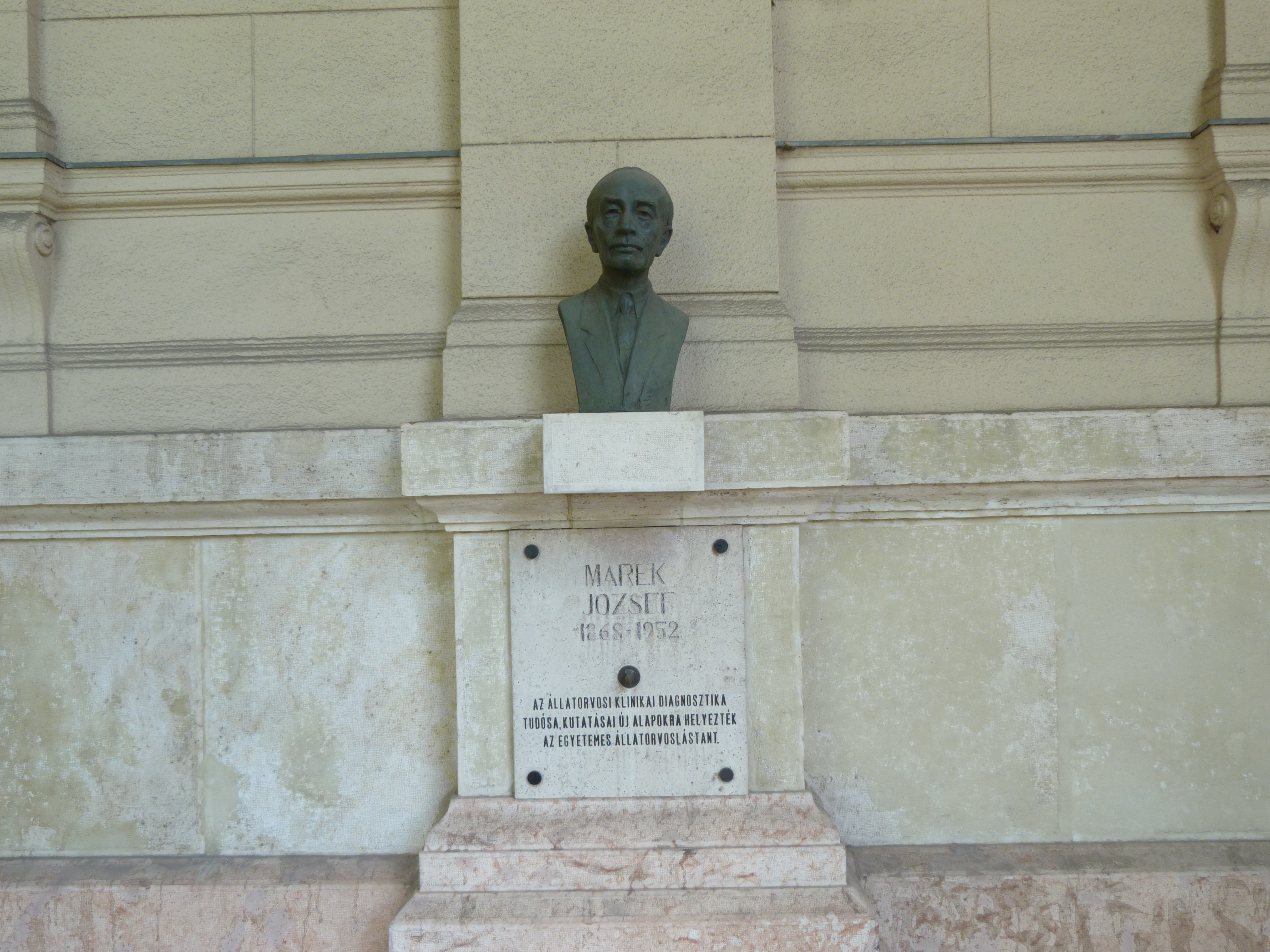 A felvétel 2012. május 19 -én készülte Budapesten, a Kossuth téren. Marek József mellszobra a Mezőgazdasági és Vidékfejlesztési Minisztérium falánál. ©© Derzsi Elekes Andor, Budapest, 2013, A kép és filmfelvételek egészben, vagy részletekben másolását, bármilyen úton történő sokszorosítását és felhasználását a szerző ellenérték nélkül, jogutódjaira is kihatóan megengedi. Az engedély kiterjed a kereskedelmi célú hasznosításra is. Kéri azonban nevének feltüntetését a felhasználás során. A Metapolisz sorozat valamennyi képe és filmje Creative Commons alatti valamint kereskedelmi - for profit - célra is felhasználható. Ajánlott hivatkozás: Derzsi Elekes Andor: Metapolisz DVD line